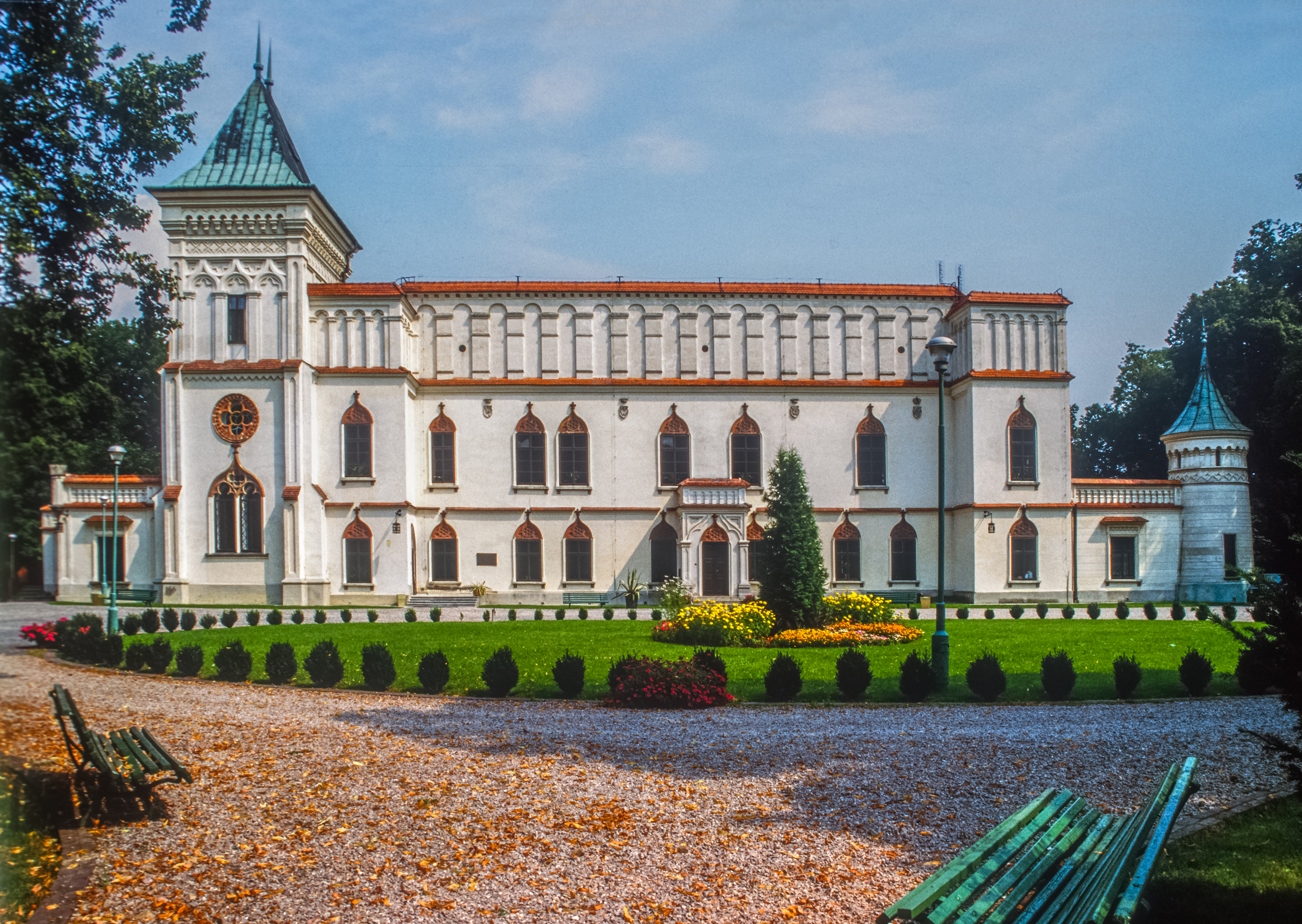 Przecław - zamek (zabytek nr rejestr. 376)